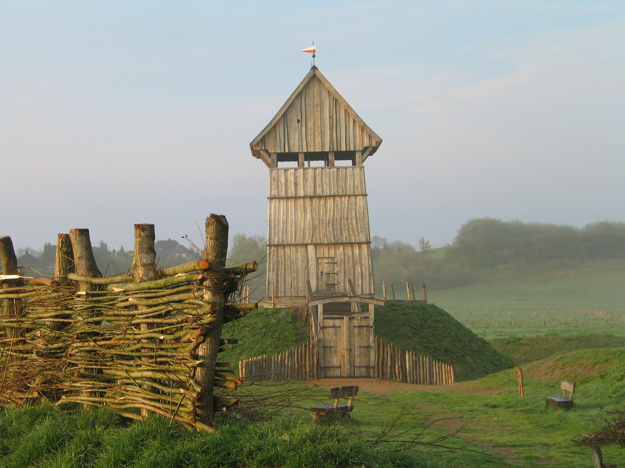 Turmhügelburg am Morgen.